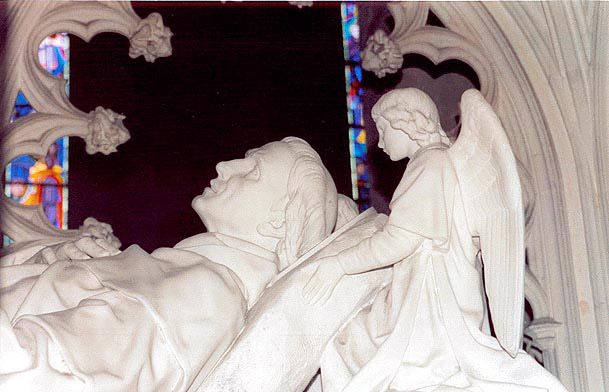 Landreger. Bez sant Erwan en iliz-veur